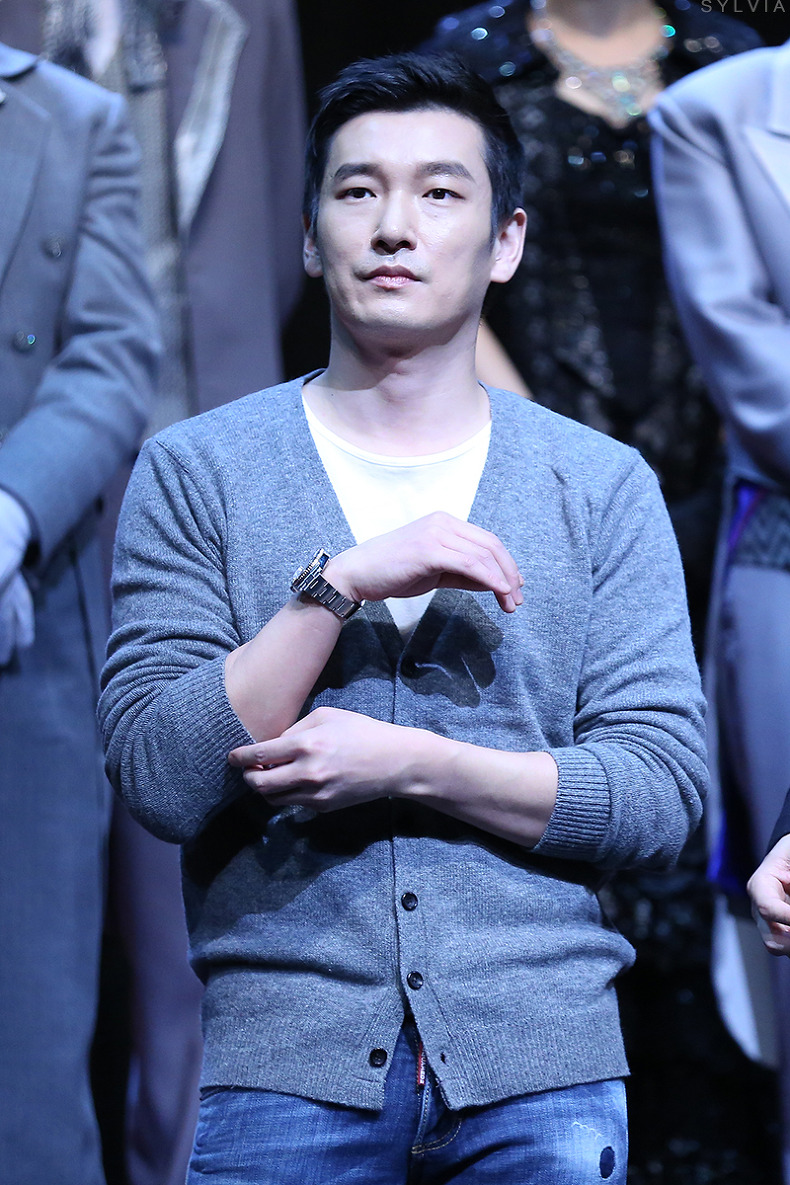 2015年2月15日音樂劇Jekyll&Hyde第1000場次公演曹承佑謝幕照片